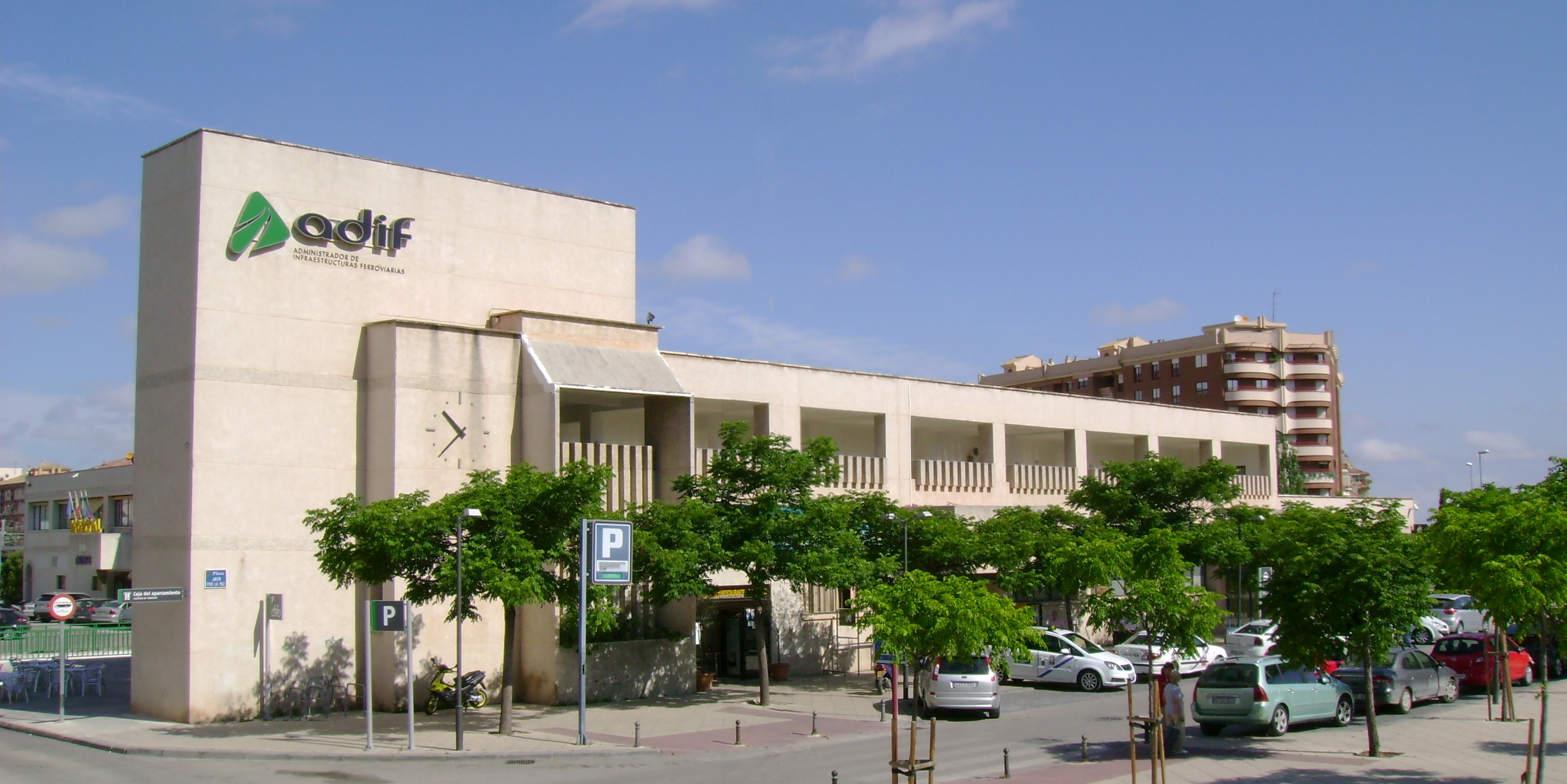 Estación de ferrocarril de ADIF (antes RENFE) de Jaén.